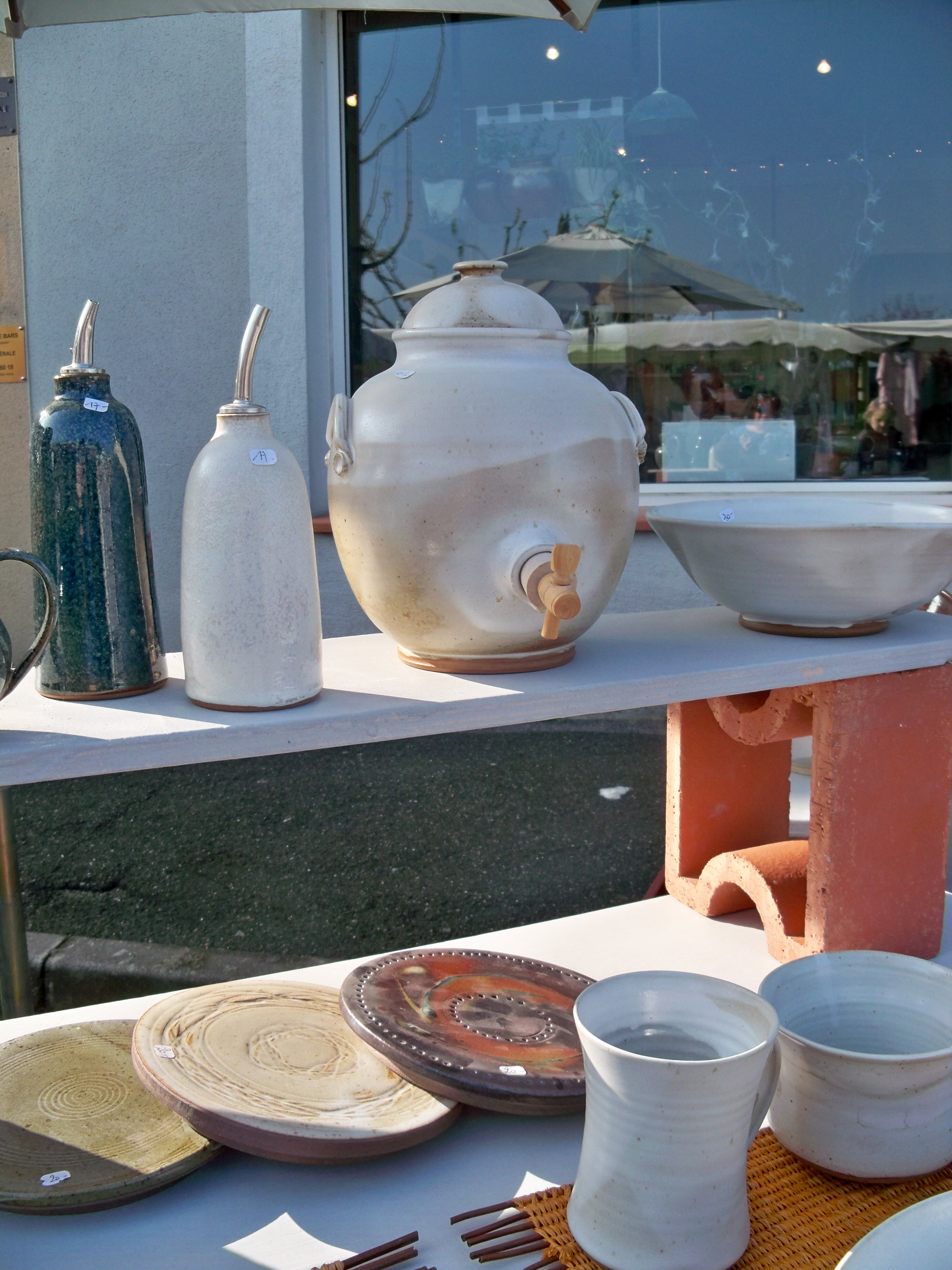 poterie au marché de Coustellet (84)